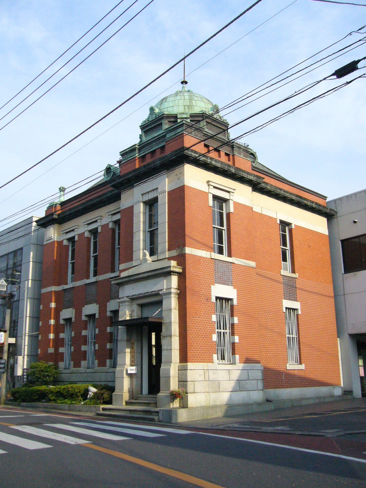 sawara-mitsubishikan,katori-city,japan